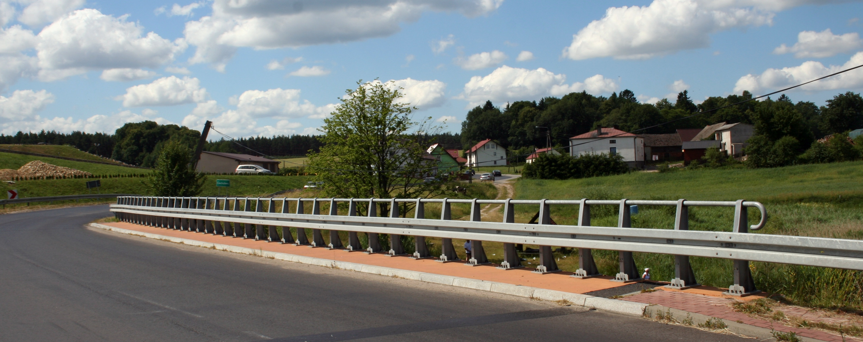 Widok na Ciecholewy z DW 212